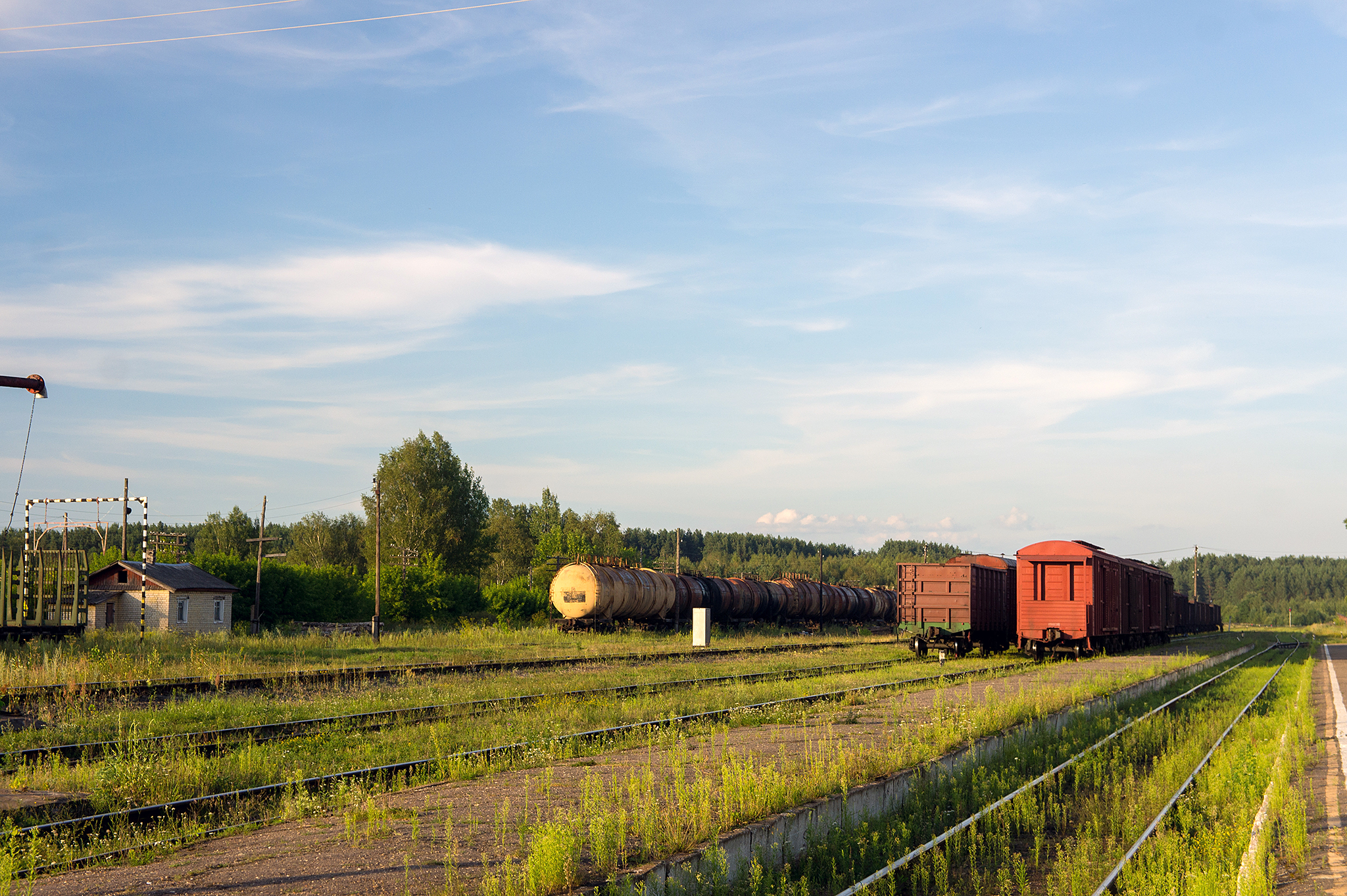 Станция Торопец Бологое-Полоцкой железной дороги